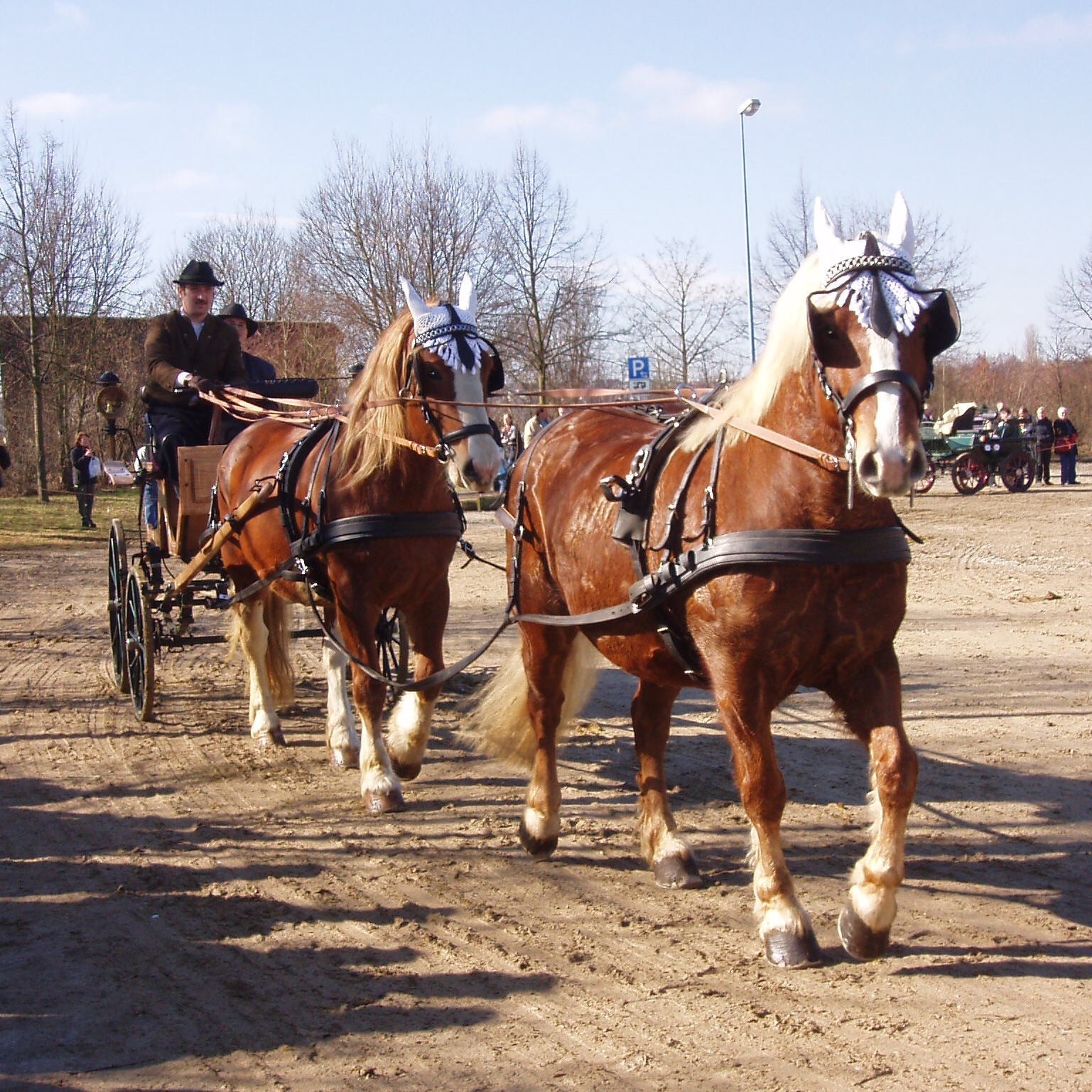 Schwarzwälder in Tandemanspannung